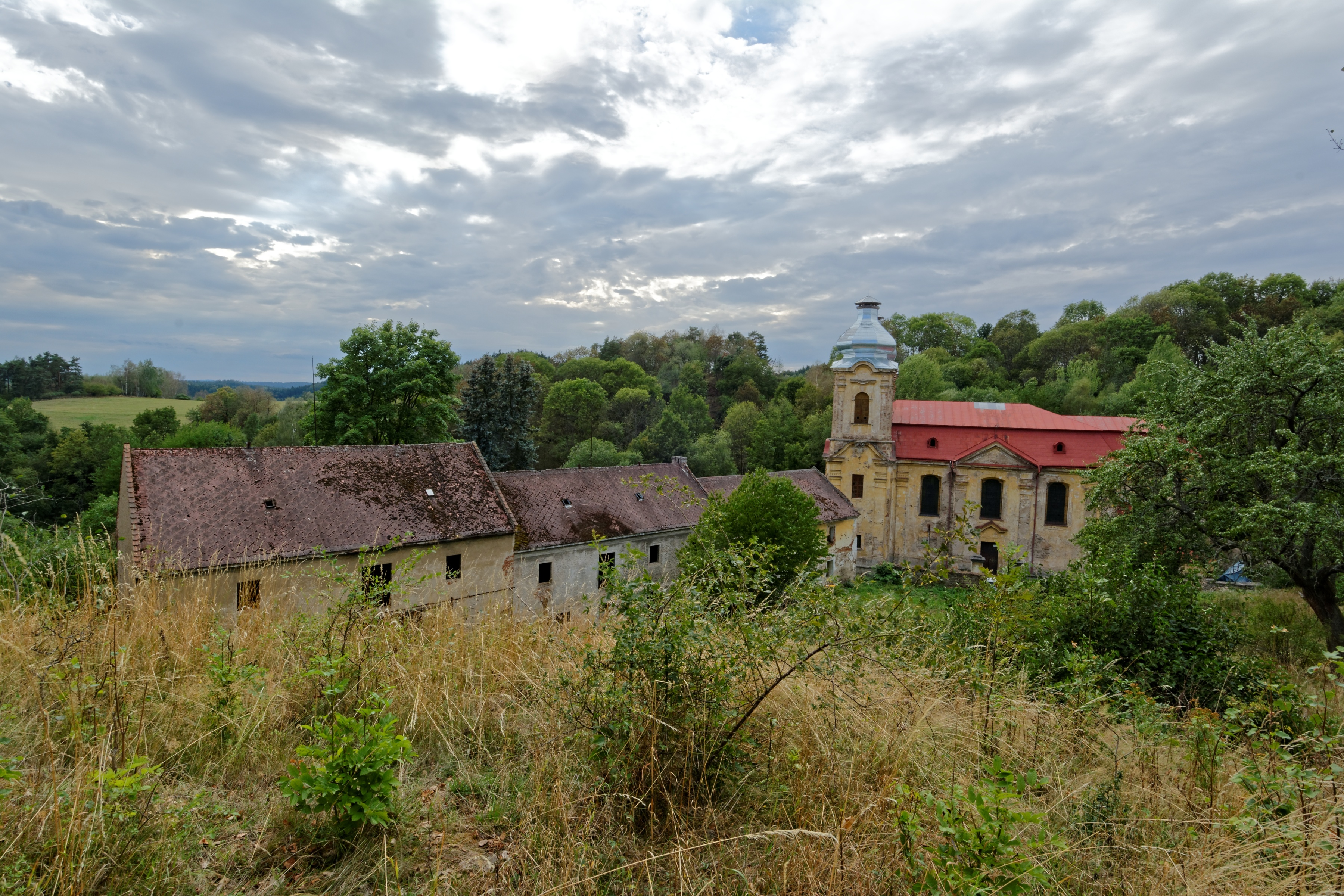 Skoky, vlevo budova bývalého hostince, za ní kostel Navštívení Panny Marie.